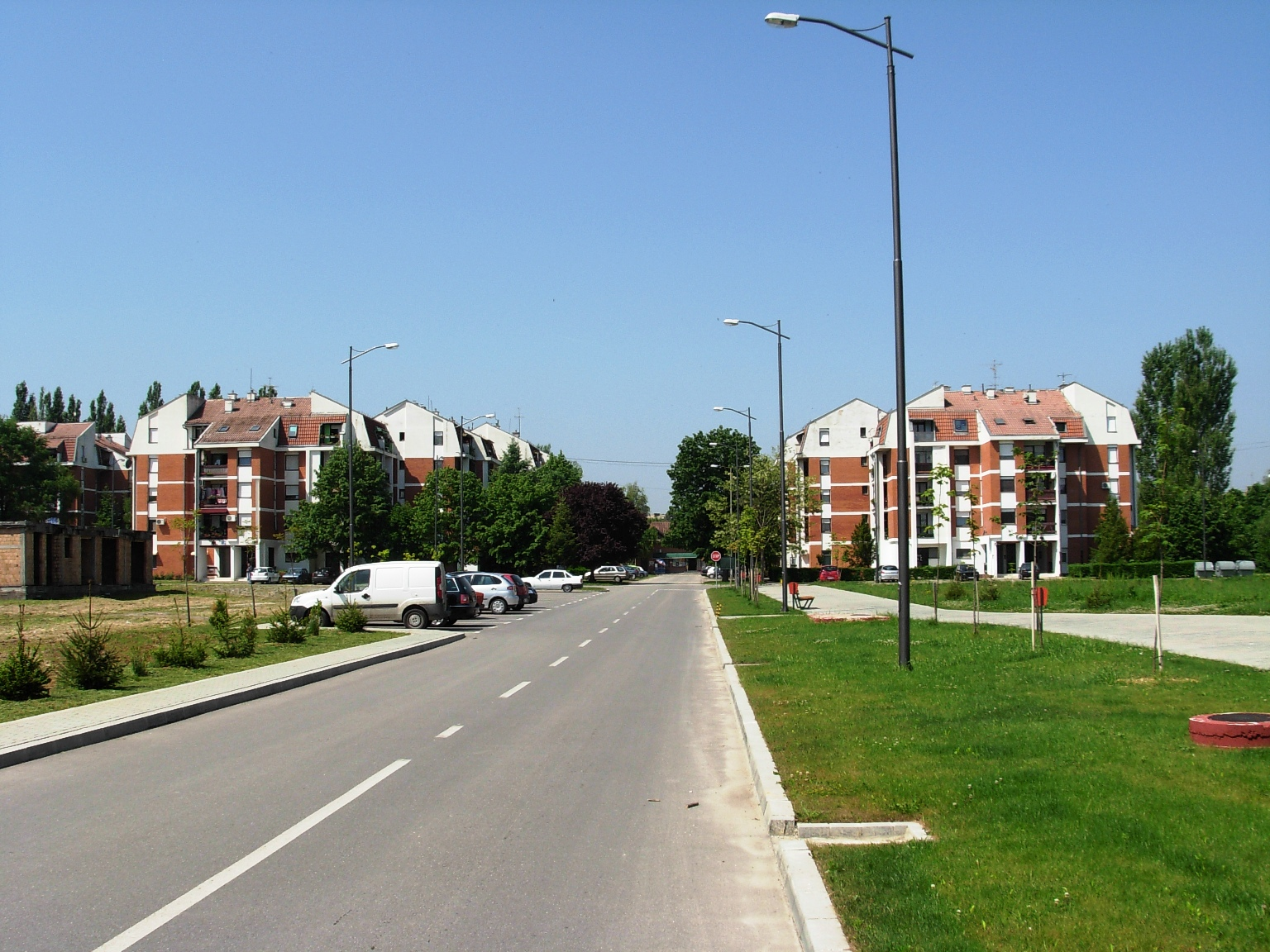 Stambeni blok Cara Dušana u Beočinu.